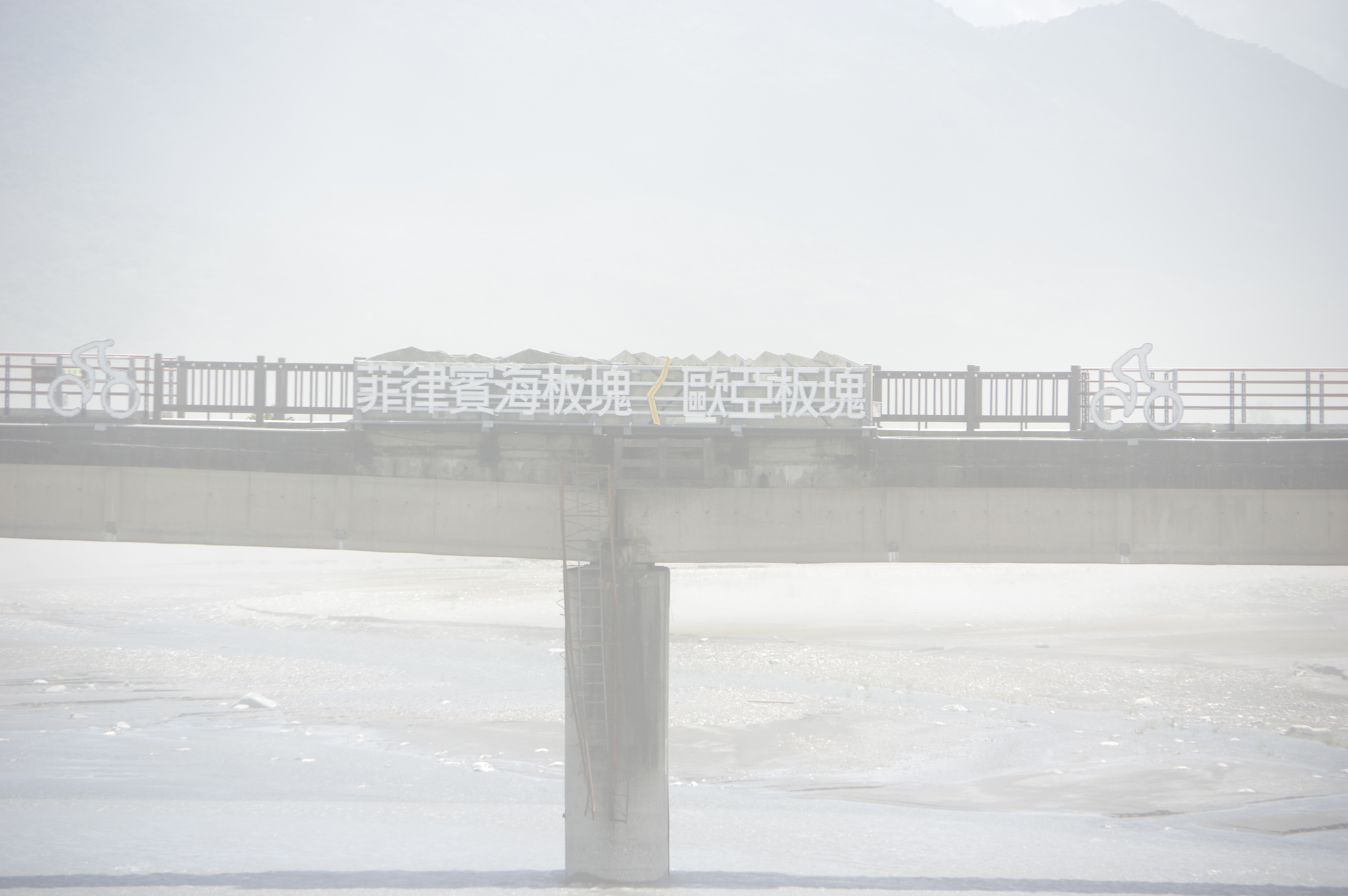 位於台灣花蓮縣玉里鎮，已改為自行車道橋的原臺灣鐵路管理局秀姑巒溪大橋，歐亞大陸板塊與菲律賓海板塊交界（池上斷層）通過該橋。